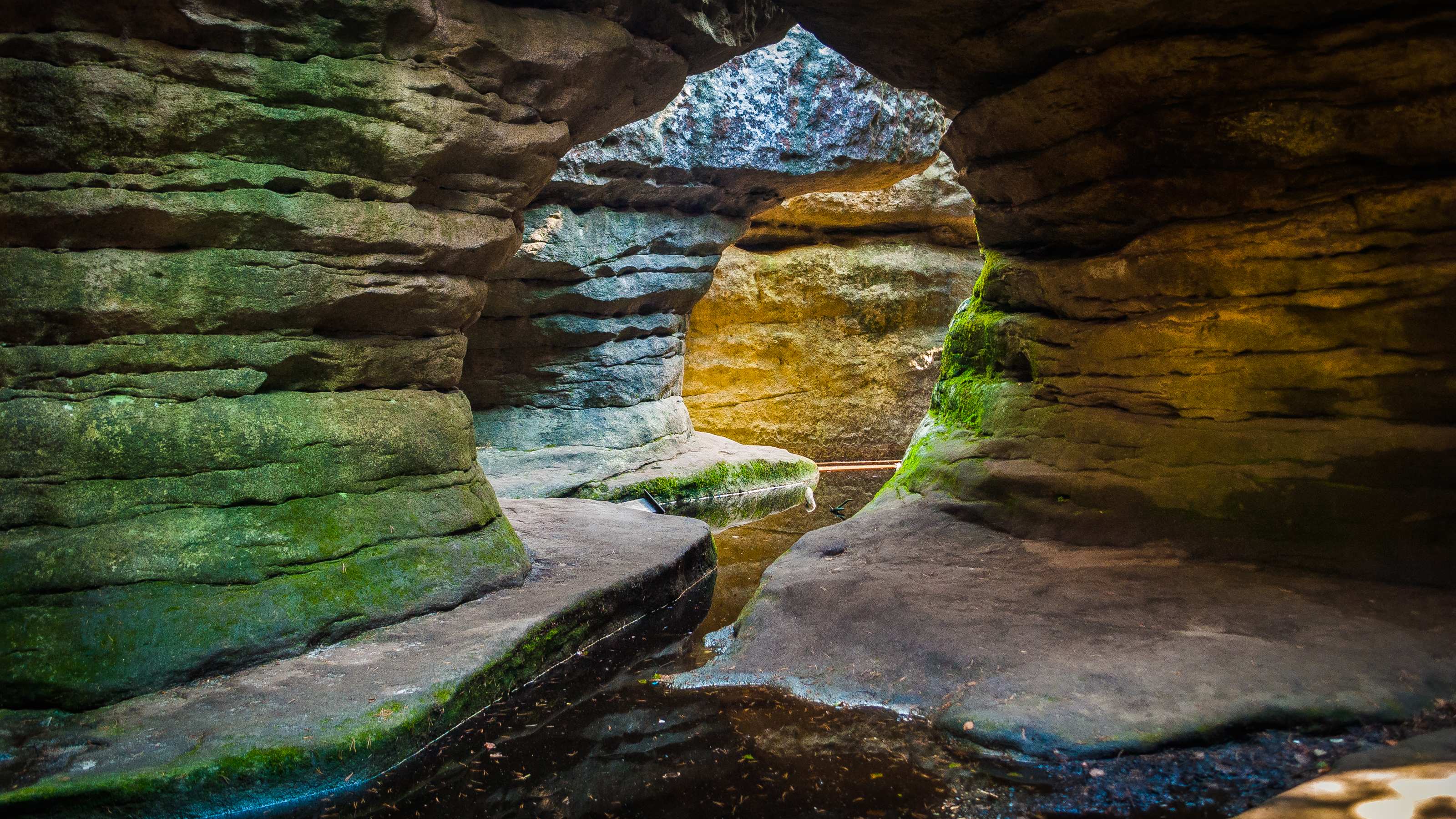 Obszar specjalnej ochrony ptaków Góry Stołowe. This is a photography of Natura 2000 protected area with ID PLB020006